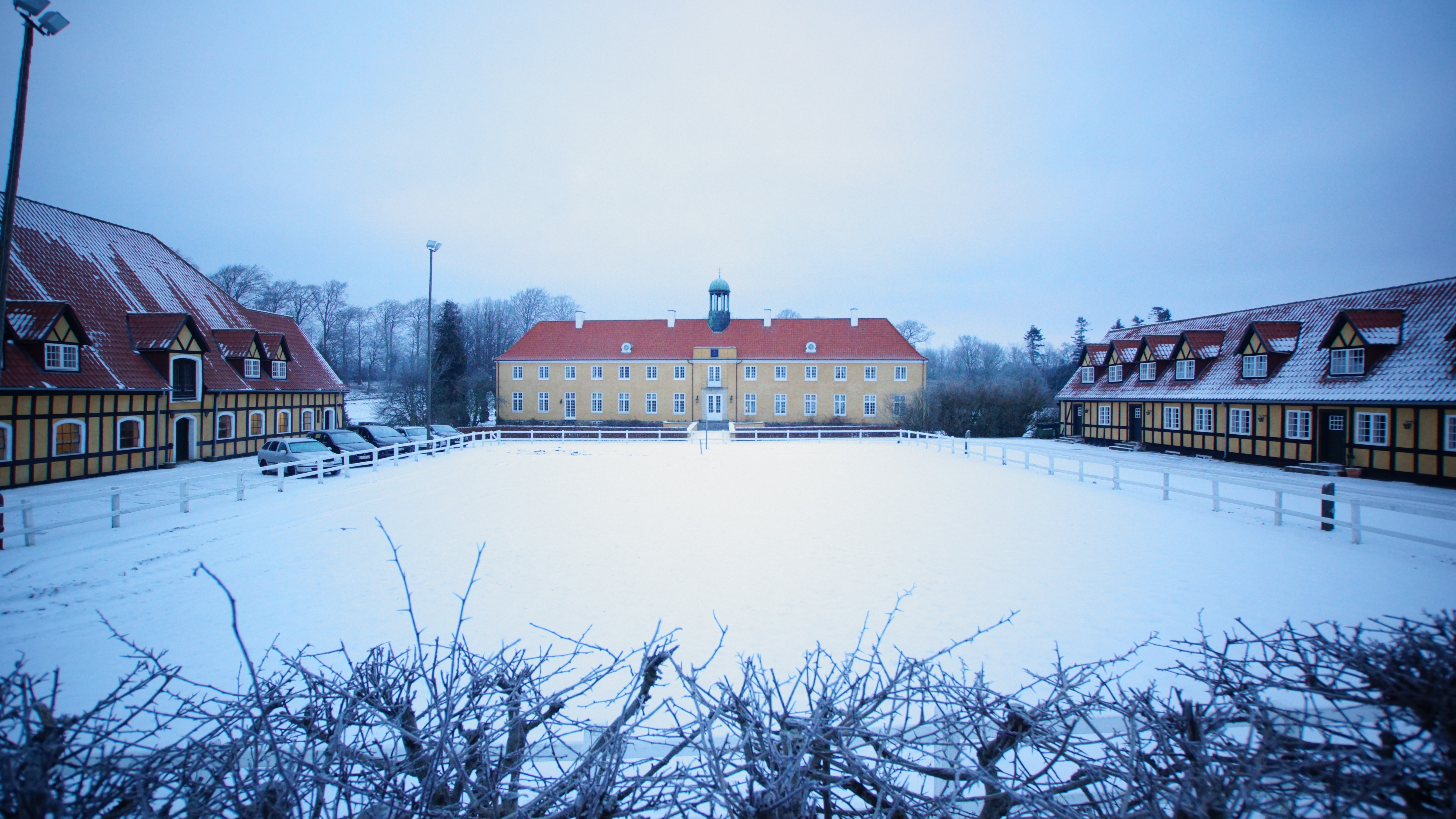 Møllerup hovedbygning vinter